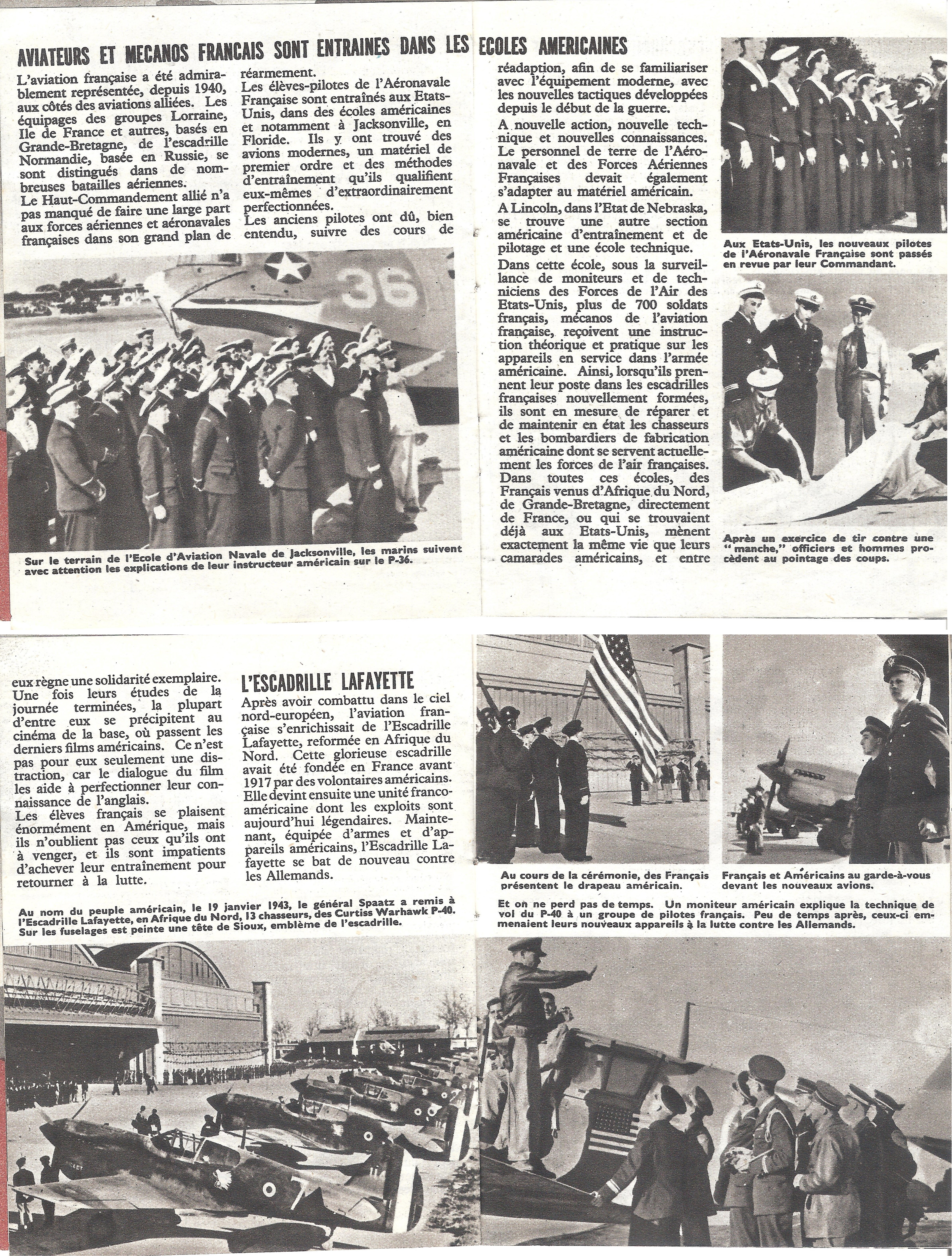 Cette illustration est extraite d’un fascicule de 30 pages, mesurant 102×132 mm (en fait, 4 pouces par 5 pouces et 3/16), intitulé « Réarmés ». On peut le dater grâce à une déclaration attribuée au président Roosevelt au dos de la dernière page, datée 2 janvier 1944, qui dit : « J’envisage le jour, par bonheur proche aujourd’hui, où les Français à l’intérieur et à l’extérieur de la France se joindront à leur alliés américains et britanniques pour chasser l’oppresseur du sol français. » Une note précise que ce fascicule fut « Publié par l’office d’information de Guerre des Etats-Unis d’Amérique U S F 91 » (Office of War Information). Il fut probablement jeté sur la France occupée par un avion américain pendant la campagne de bombardement de la première moitié de 1944, sans doute dans la région de Rennes où son propriétaire le ramassa, et dans les archives duquel il fut retrouvé en 2019. Archives Jean Grosdidier de Matons